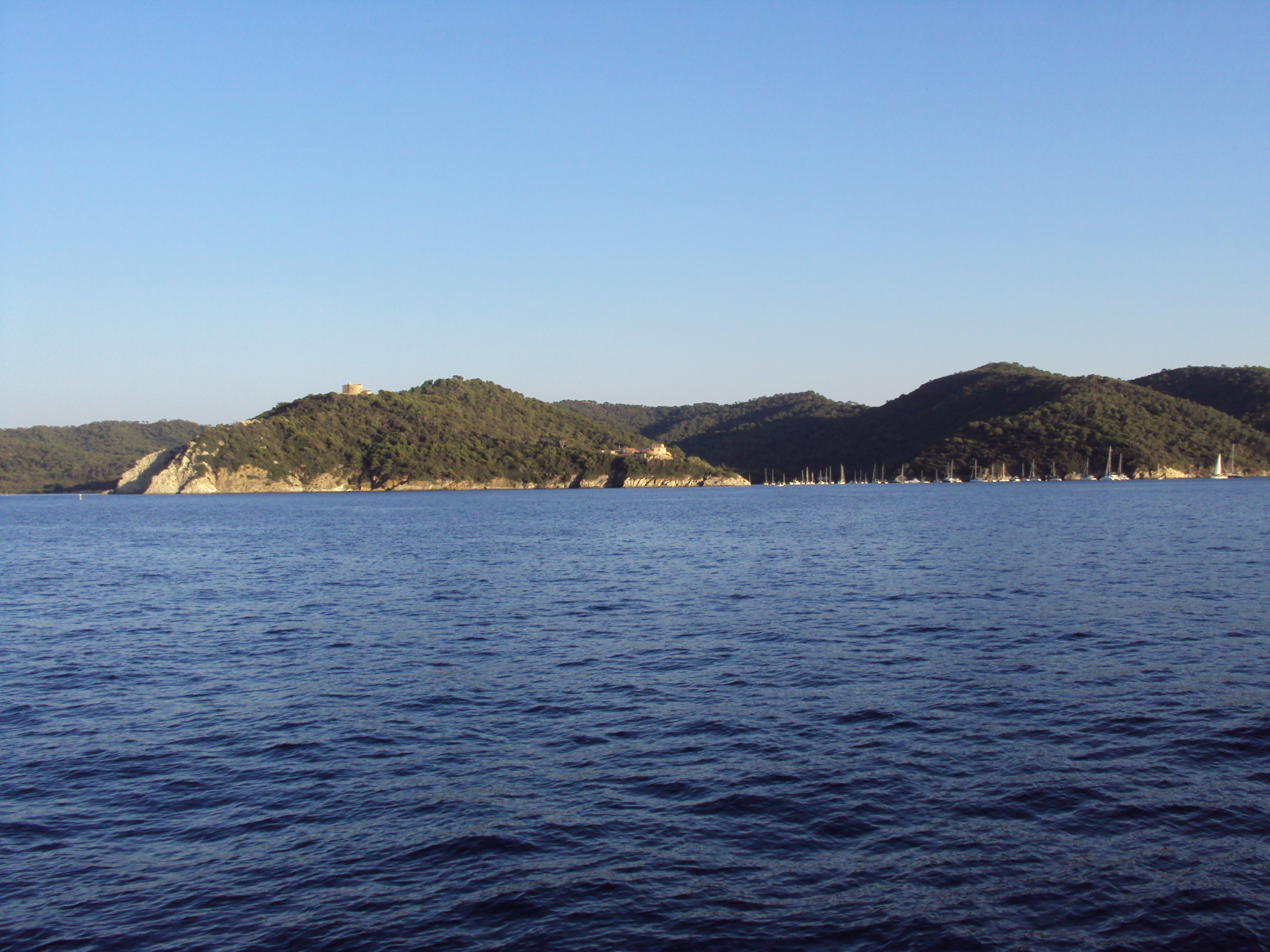 Vue de la côte ouest de l'île de Port-Cros (îles d'Hyères, Var, France).